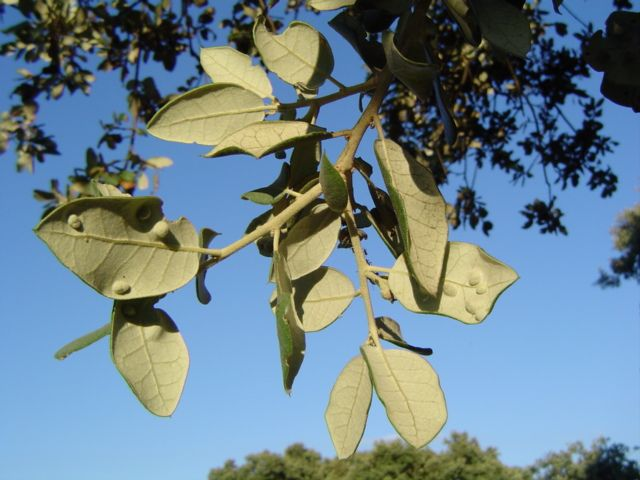 Hojas de Quercus rotundifolia. Valle de Amblés. Ávila. España